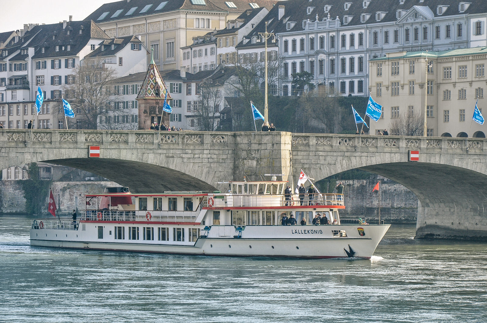 MS Lällekönig